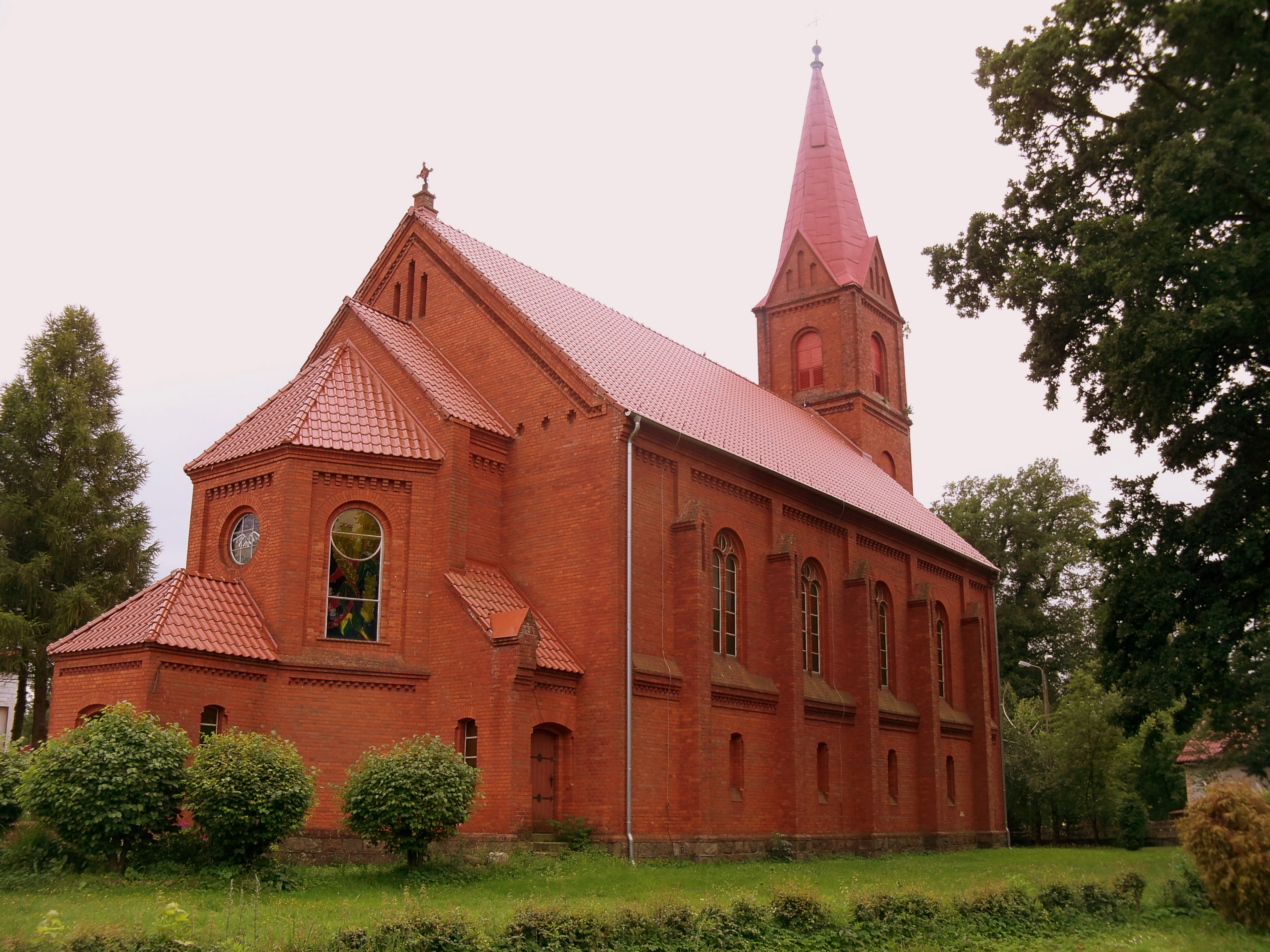 Kościół Narodzenia NMP w Świeszynie